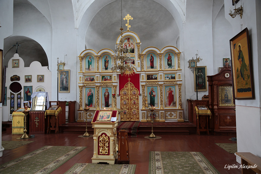 Мсціслаў. Царква Св. Аляксандра Неўскага